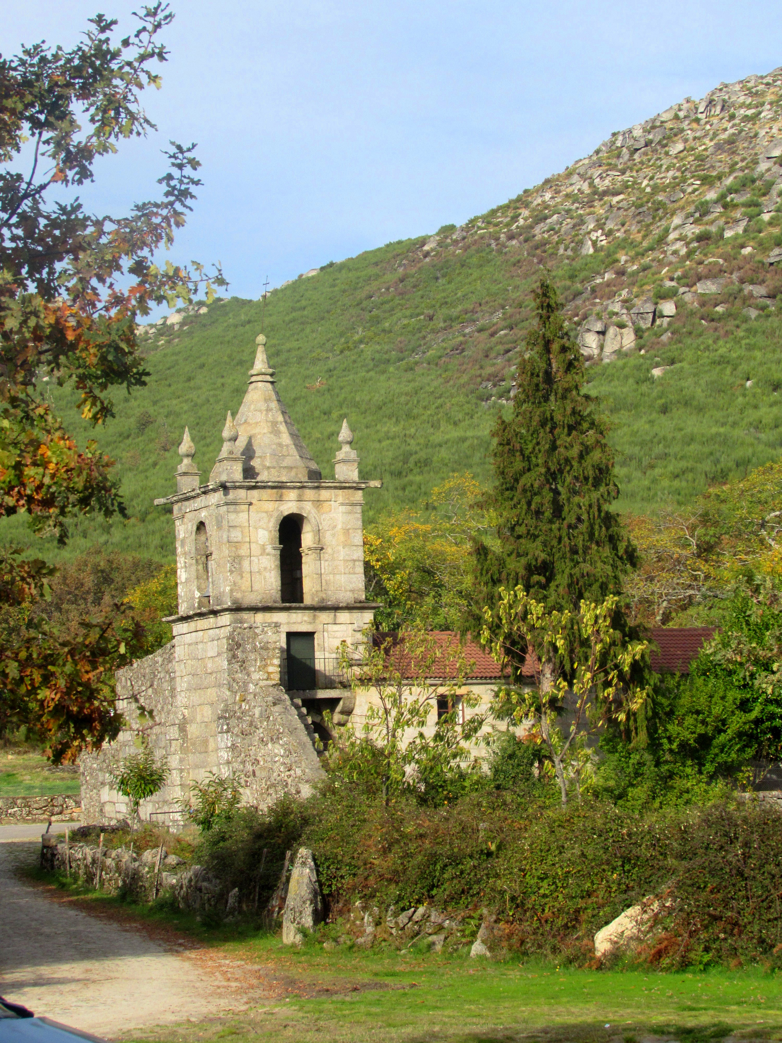 Igreja Matriz de Gontães, freguesia de Pena, Quintã e Vila Cova, Vila Real, Portugal